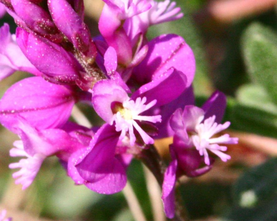 Polygala vulgaris